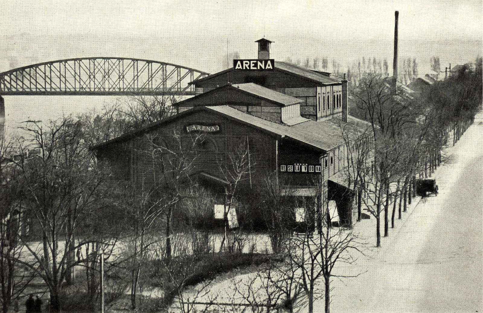 Smíchovská aréna před rokem 1938